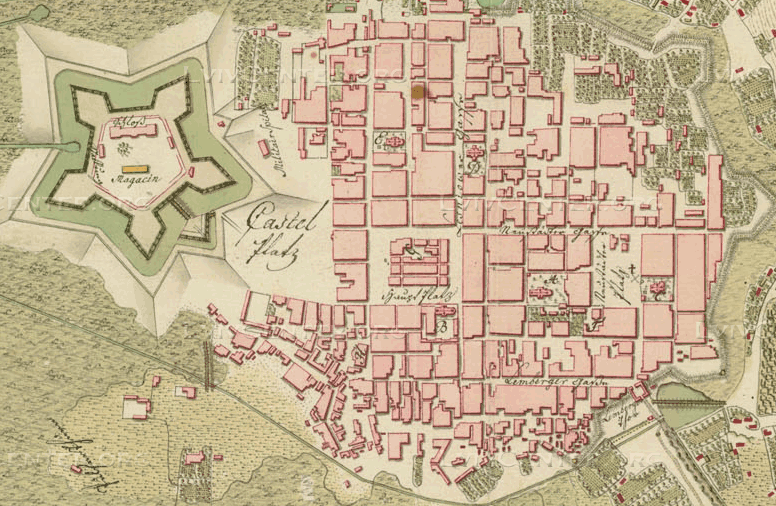 Стара рукописна карта Бродів з околицями кінця 18 століття виконана лейтенантом Луї де Жанном. На плані показано замок, основні дороги та міську забудову